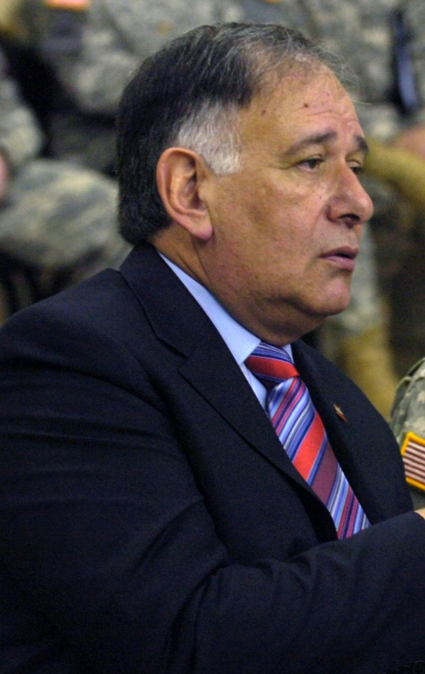 Yona Yahav